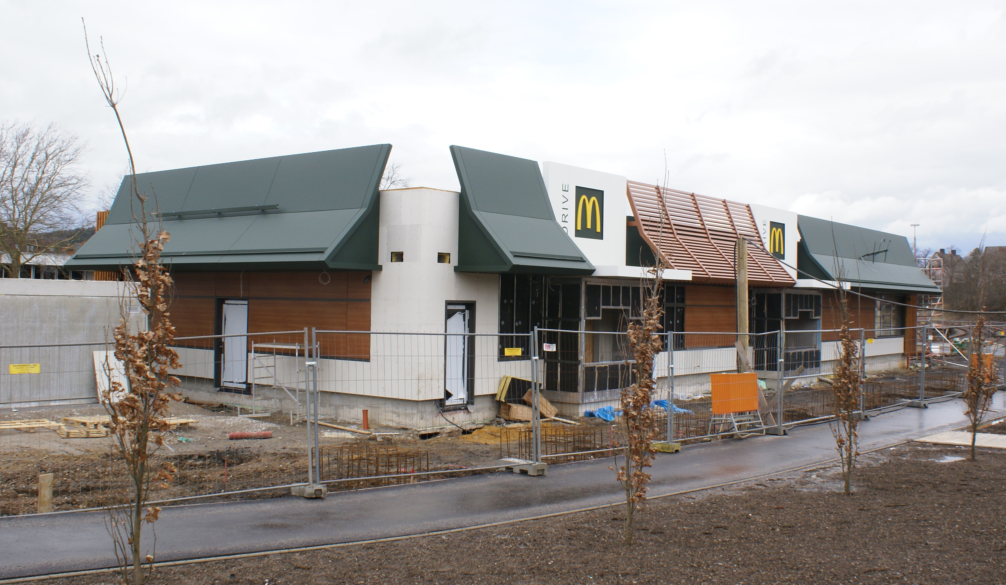 McDonalds Hemer in Bau